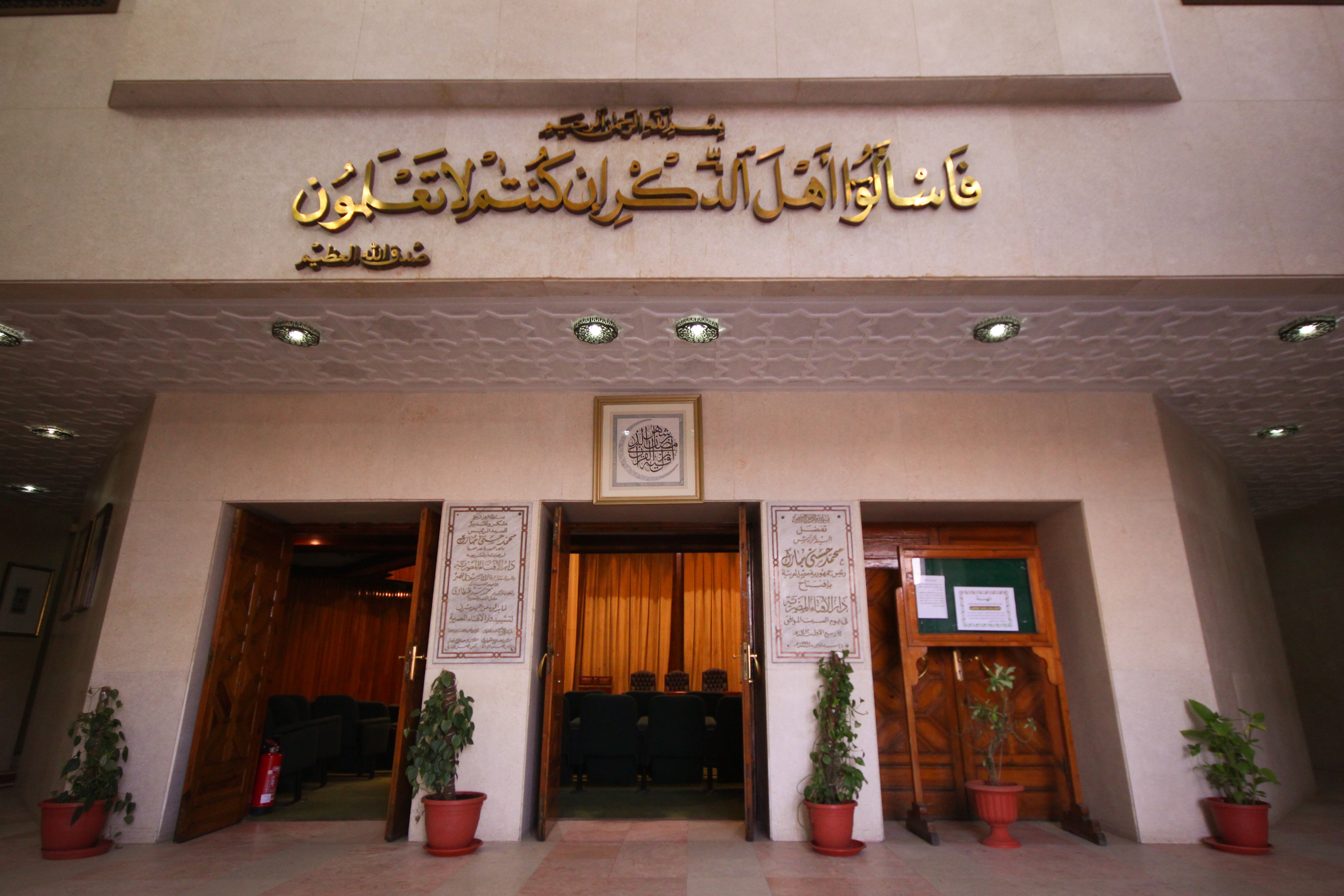 مدخل قاعة